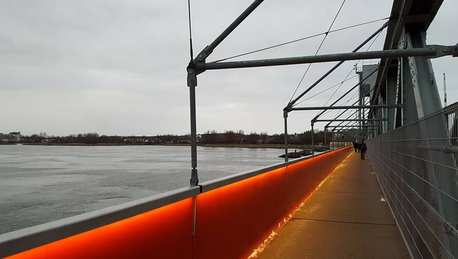 Gang- og cykelstien er hæftet på vestsiden af jernbanebroen mellem Aalborg og Nørresundby